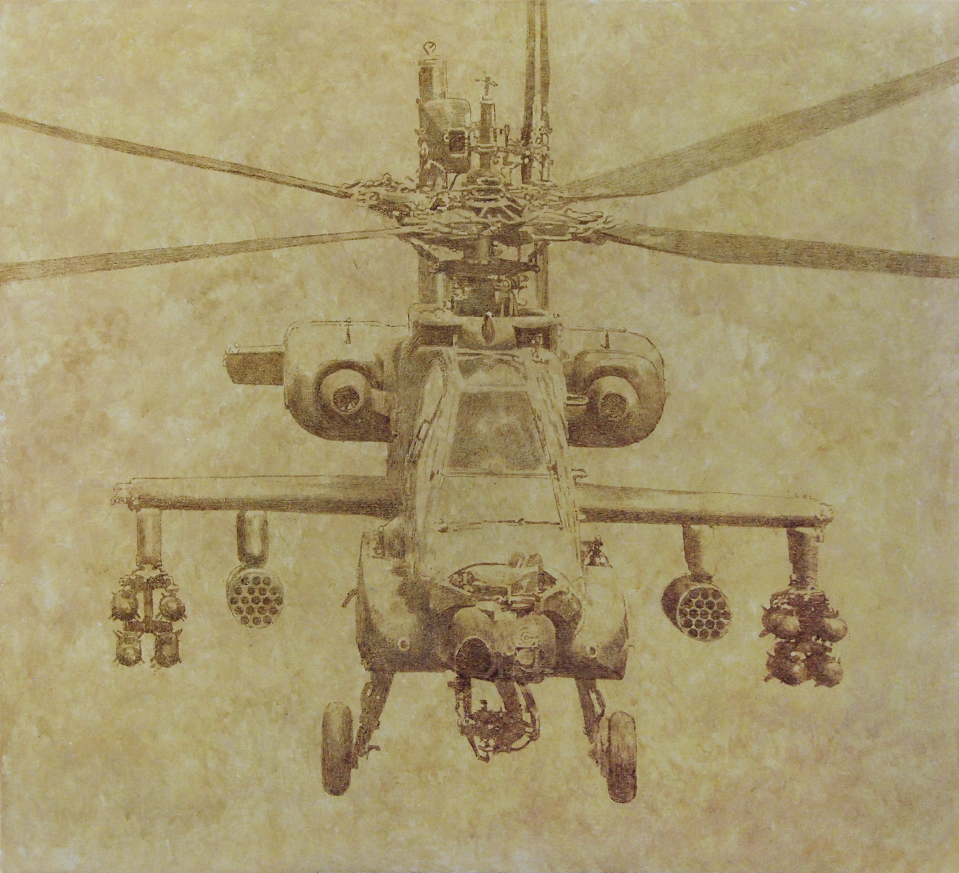 В. Колесников. Helicopter. 90x105, 2012